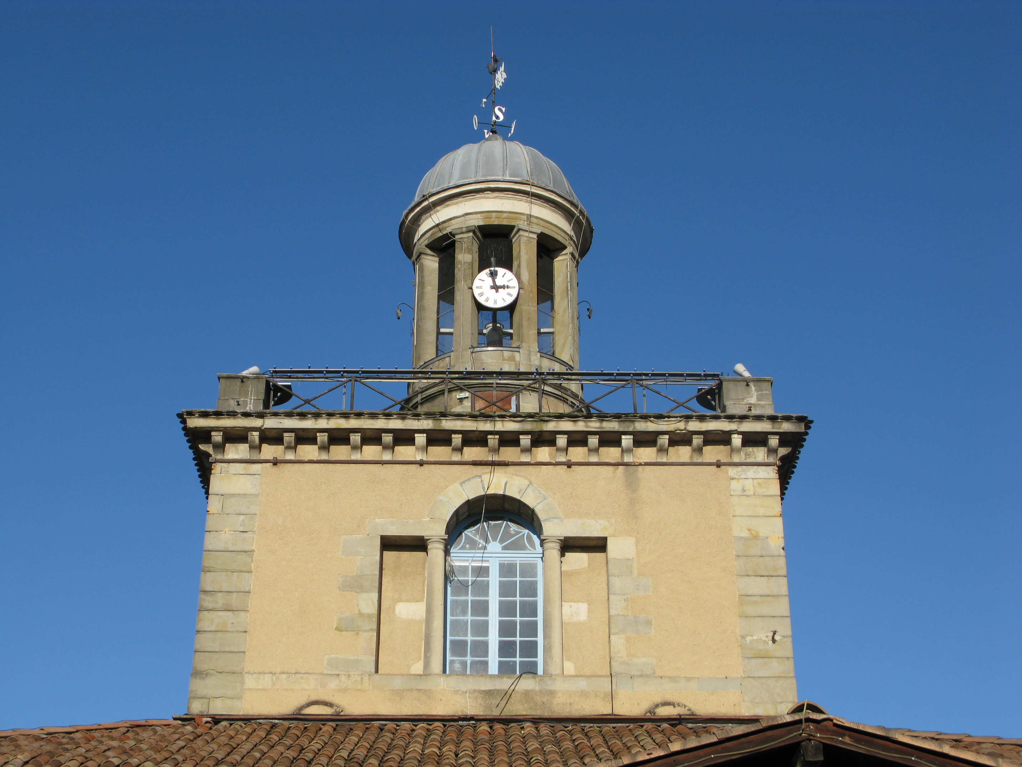 Vue détaillée de la halle du beffroi de Revel.